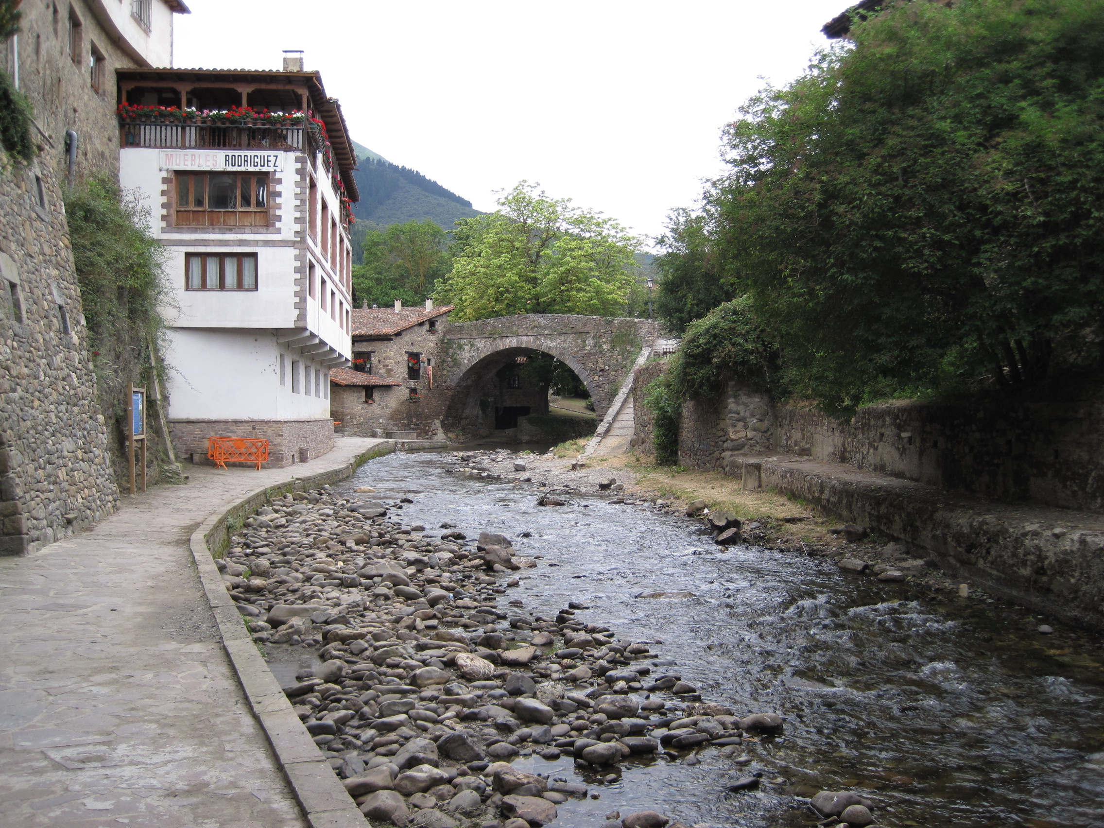 El río Quiviesa a su paso por Potes (Cantabria, España).